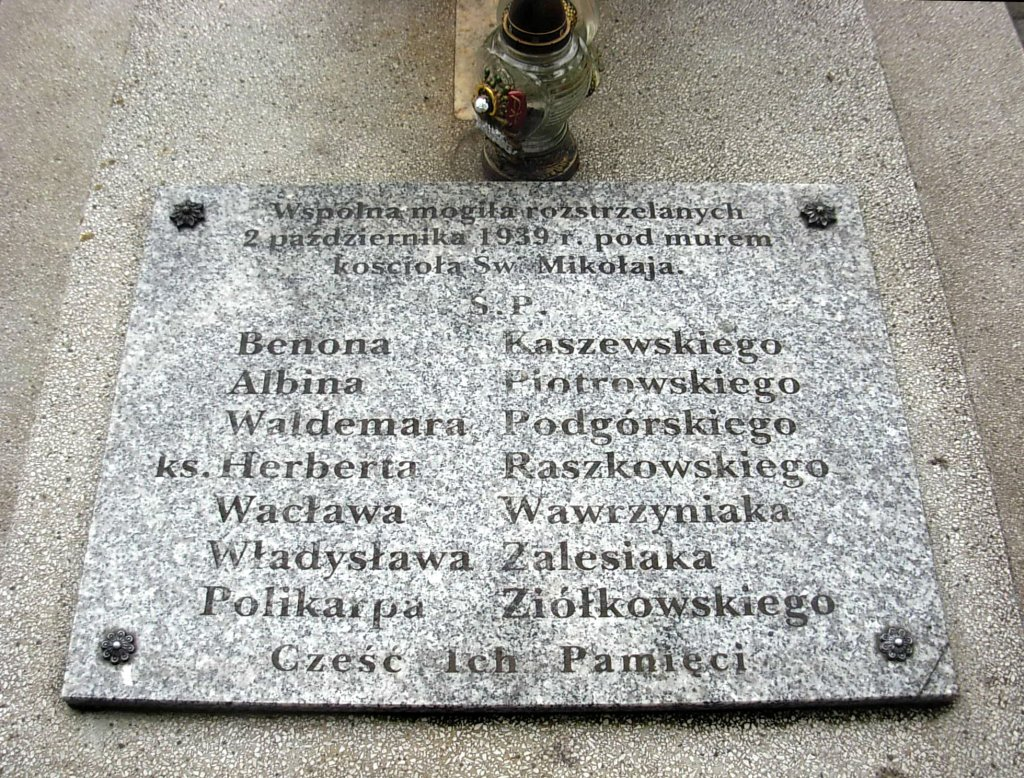 Cmentarz św. Jana Bydgoszcz - tablica pamiątkowa ku czci rozstrzelanych 2 października 1939 r. na rynku w starym Fordonie